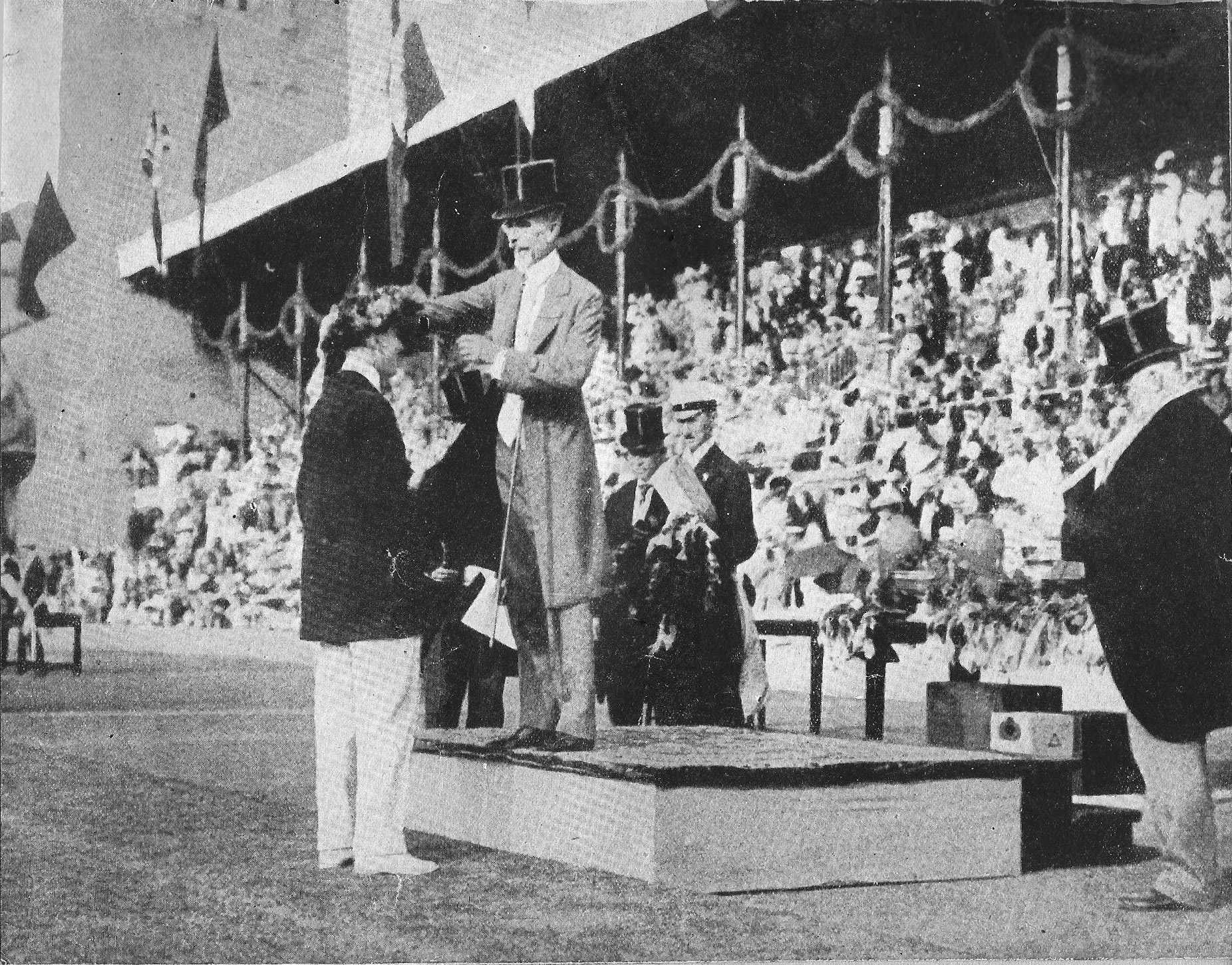 JO de 1912, le roi Gustav V sur le podium remet une médaille .